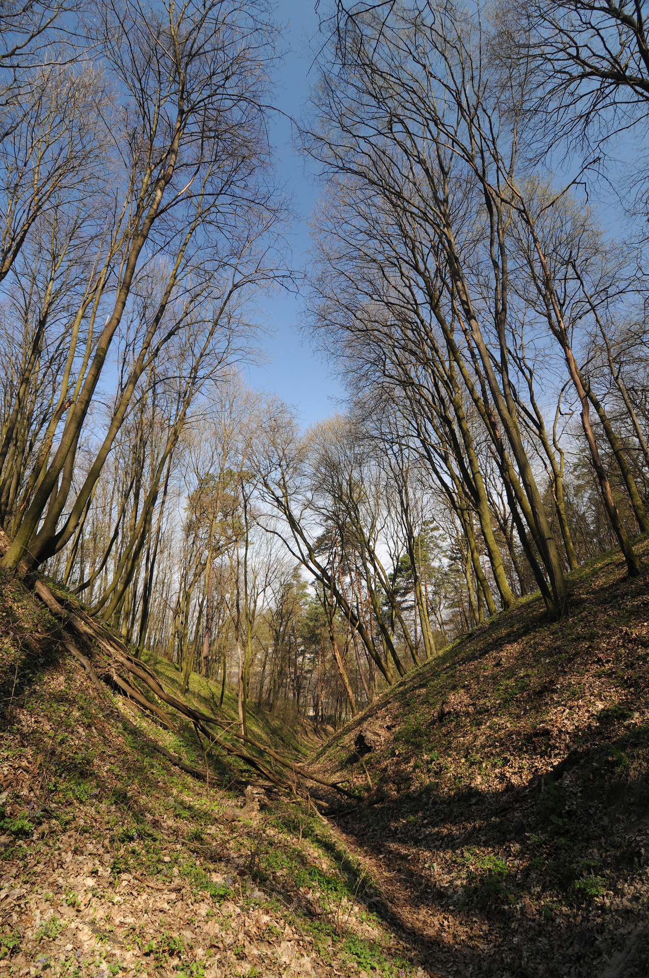 ландшафтний заказник "Мошногірський"